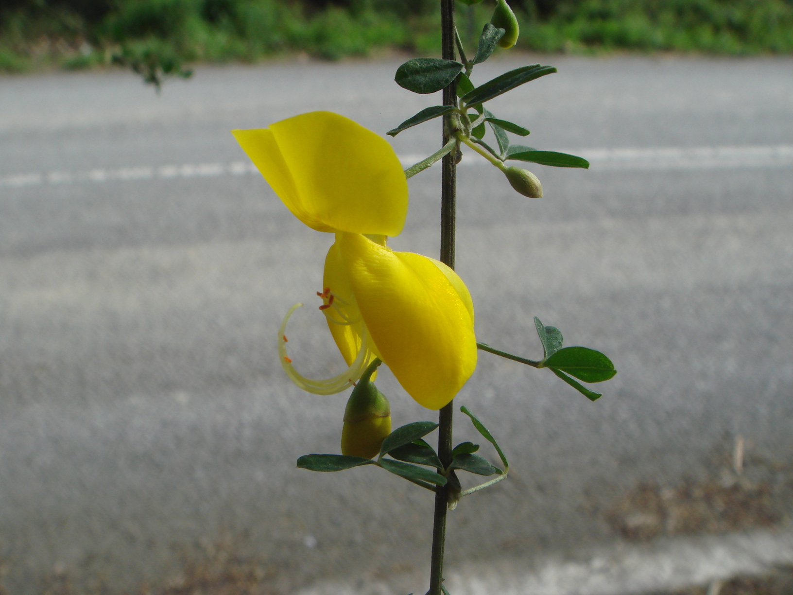 Flor de piorno andaluz (Cytisus arboreus subsp. baeticus), Ceuta, España